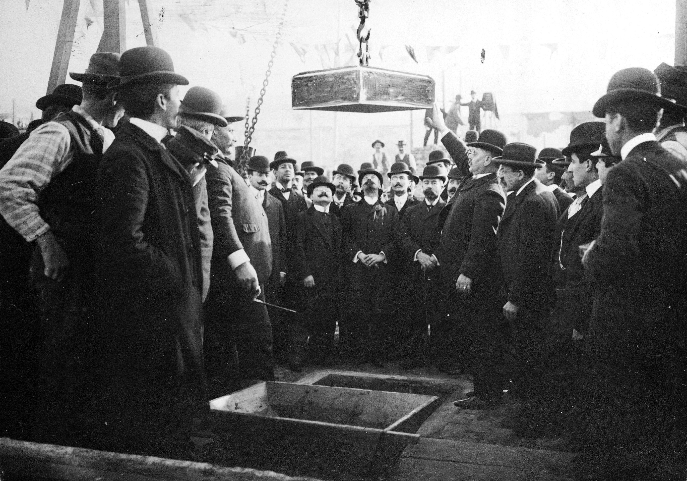 Palacio de Justicia, colocación de la piedra fundamental. Buenos Aires, 1904. Inventario 13717 General Archive of the Nation (Argentina) Native nameArchivo General de la Nación ArgentinaLocationBuenos Aires, ArgentinaEstablished28 August 1821WebsiteAGNAuthority control : Q2860529 This file, was provided to Wikimedia Commons thanks to an agreement between the General Archive of the Nation of Argentina and Wikimedia Argentina.